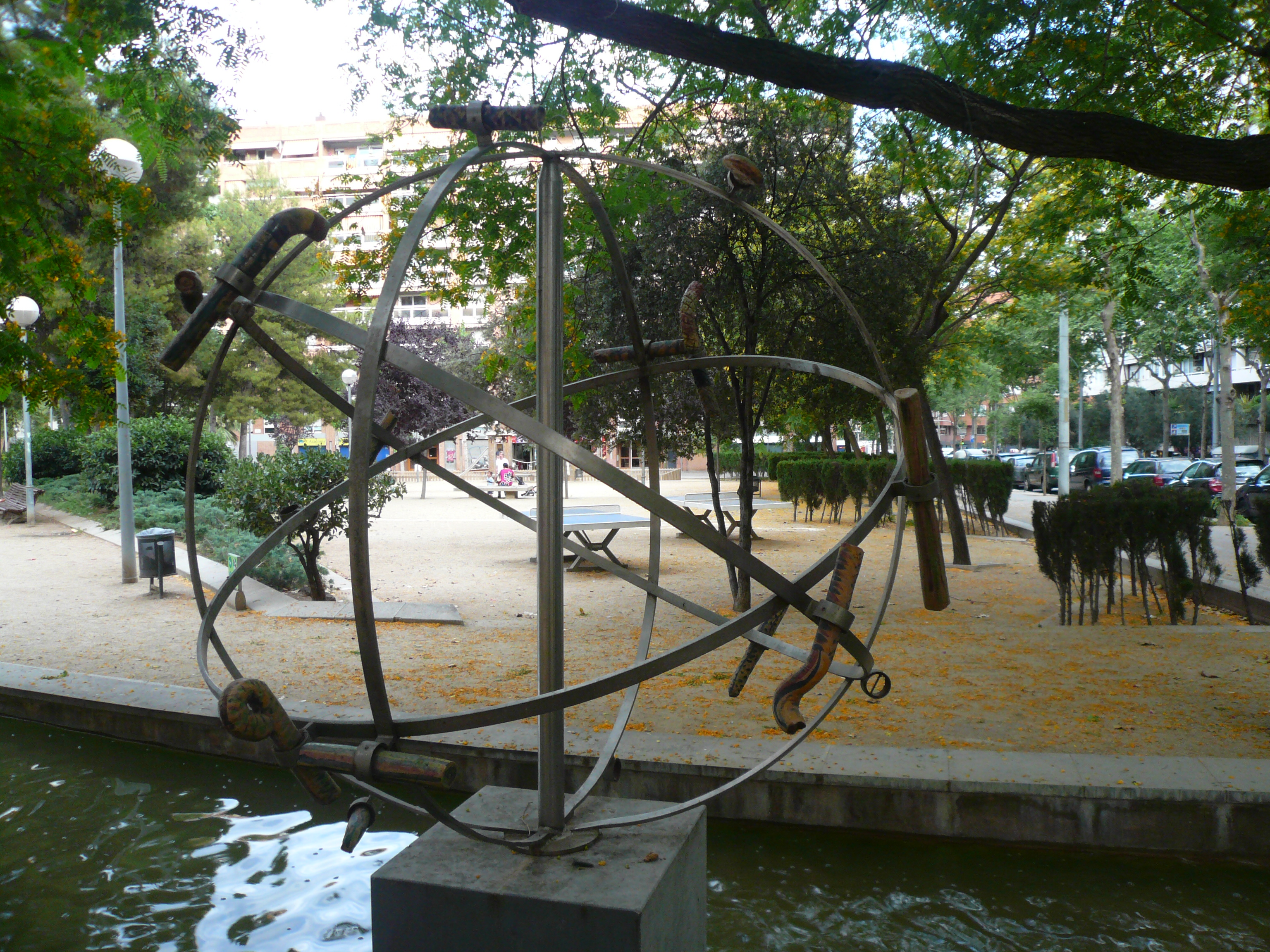 Euclidiana, Els quatre elements. Pl. de les Corts (Barcelona). Escultor: Luis Gueilburt, signada. Material: acer inoxidable i peces ceràmiques sobre base de pedra calcària. 1989, en l'actual emplaçament des de 1996. 68″ N, 2° 08′ 10.14″ E